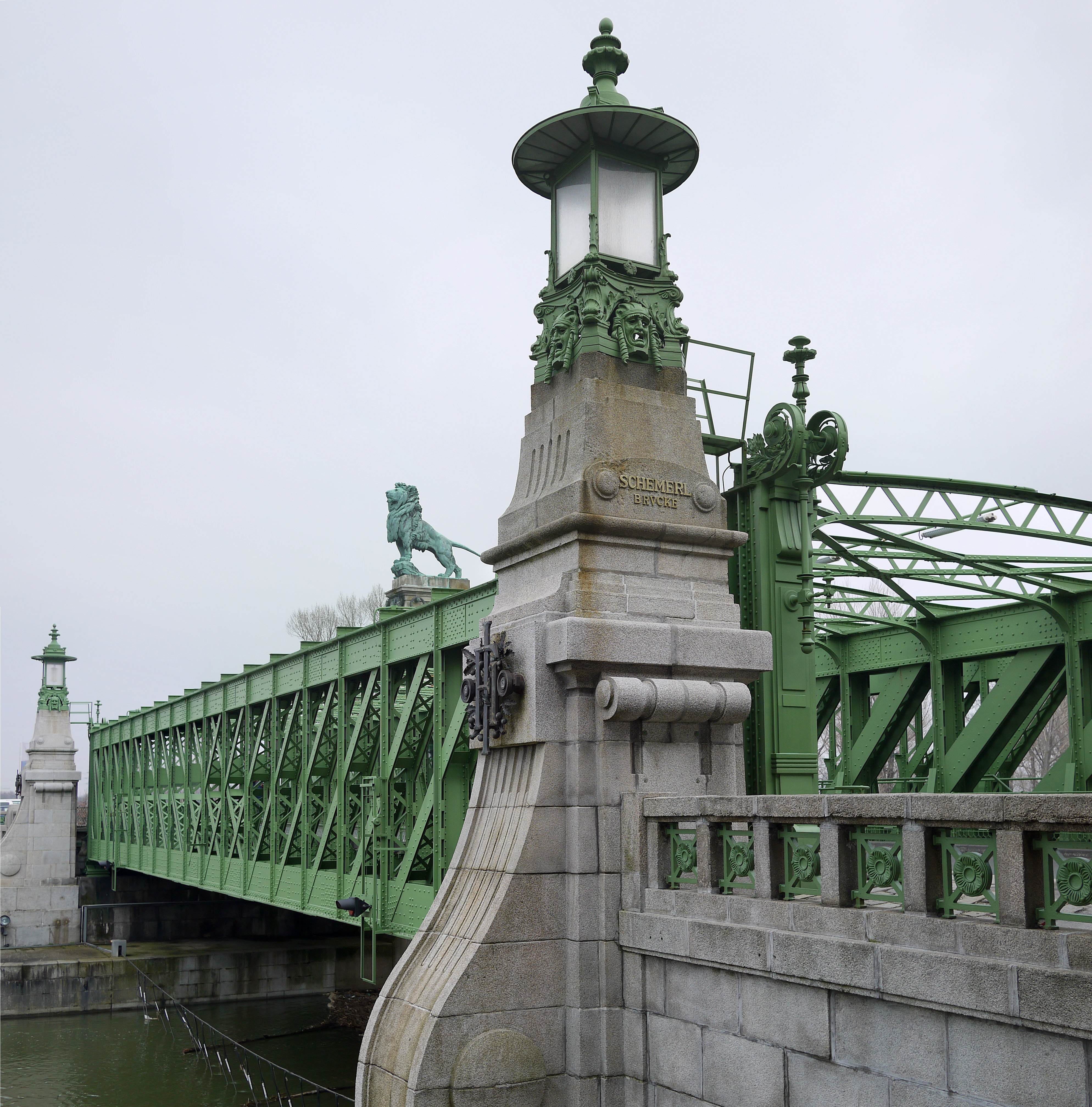 Straßenbrücke, Josef-von-Schemmerl-Brücke und Wehranlage Nußdorf